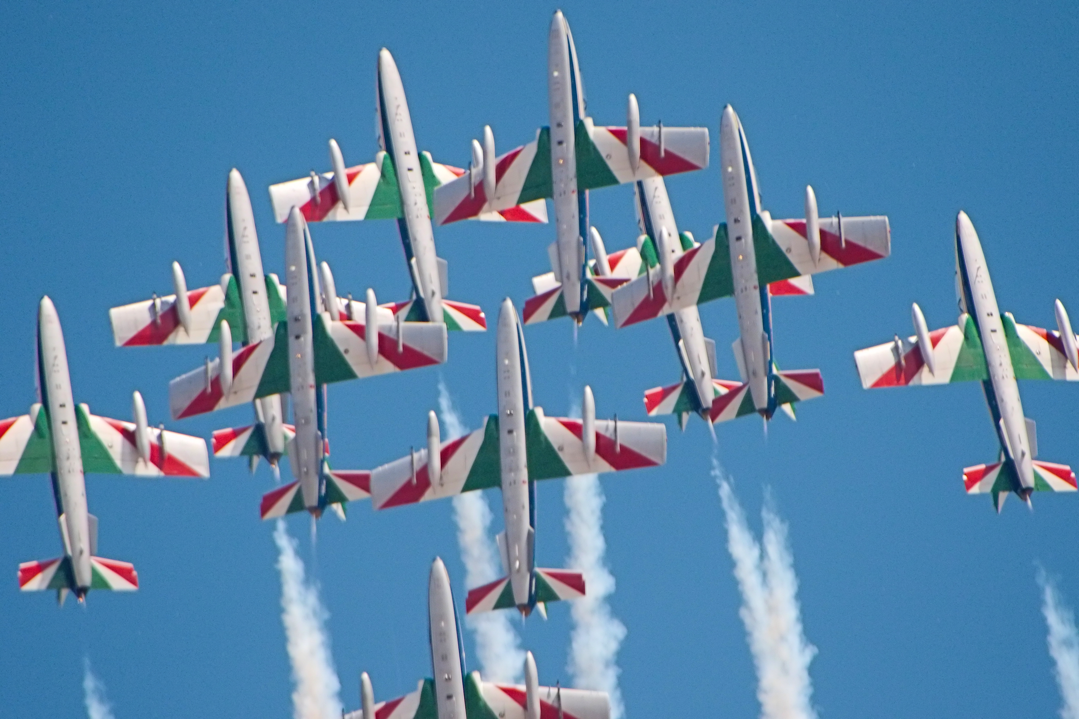 Frecce di Tricolori - RIAT 2018